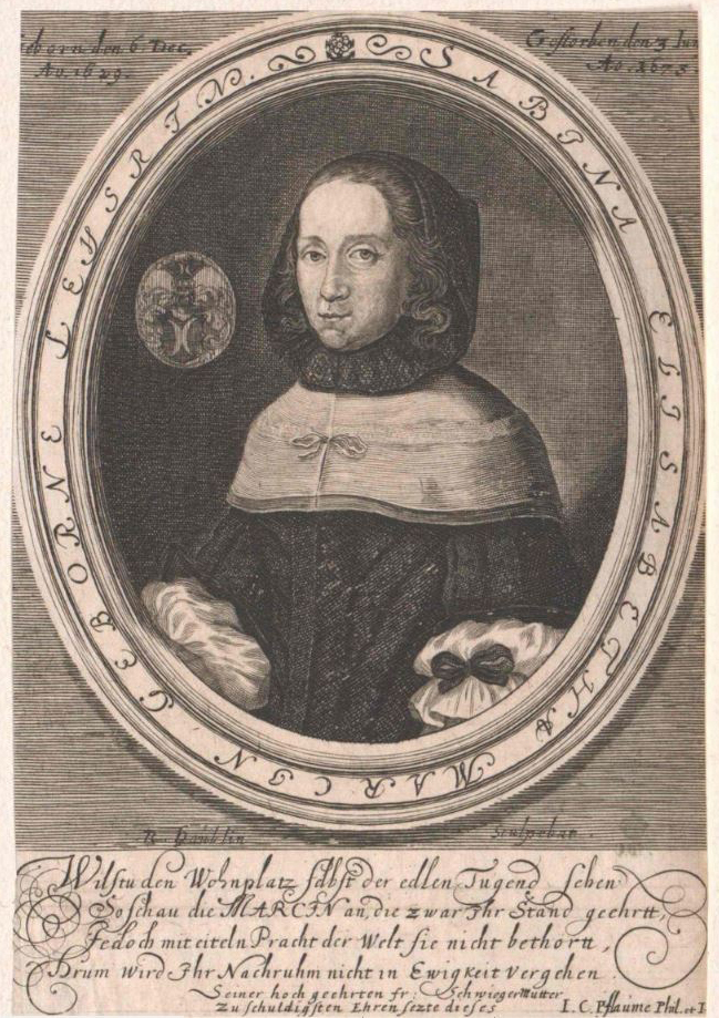 Sabine Elisabetha Marci, geb. Leyser